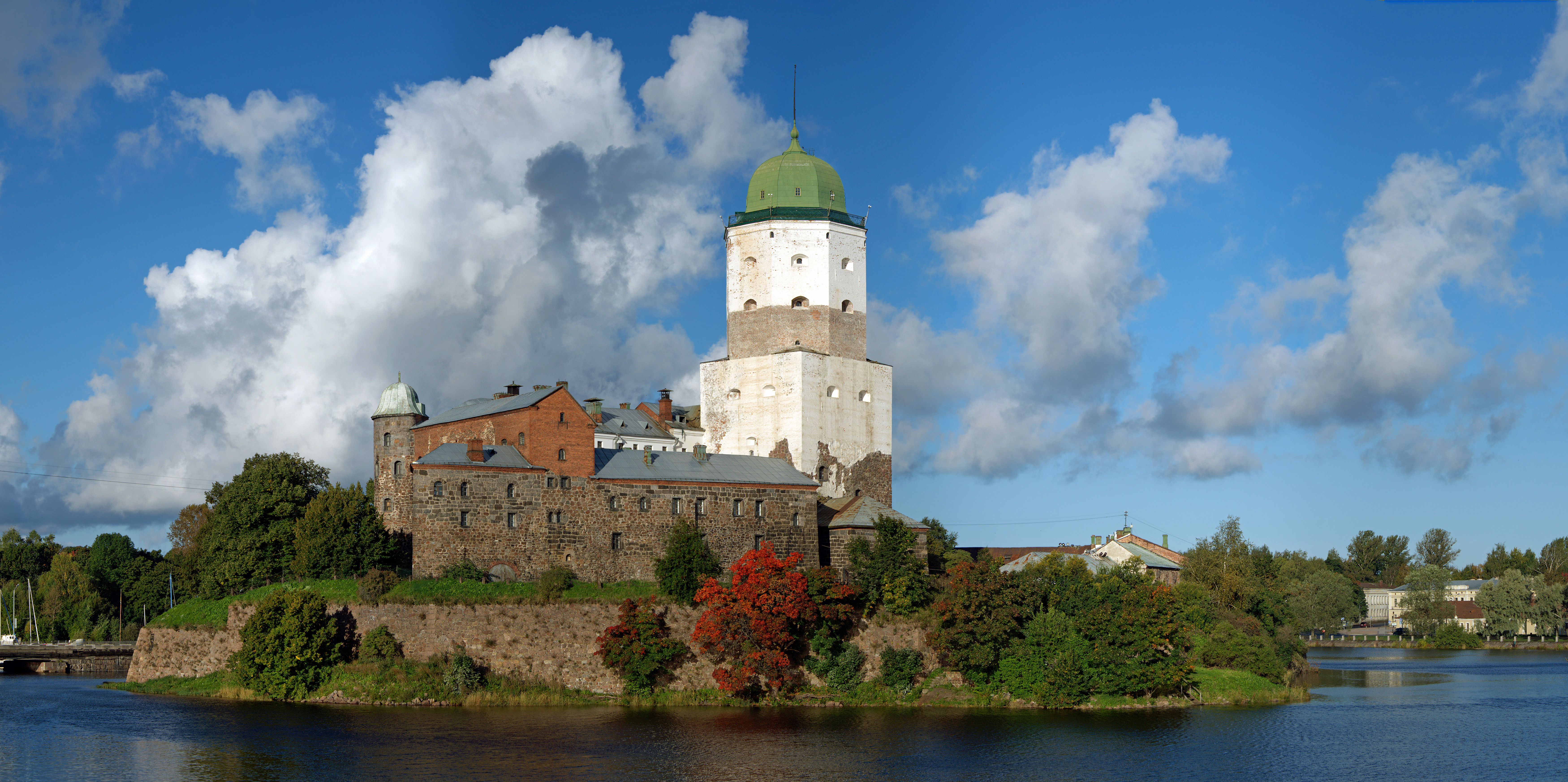 Замок-крепость (комплекс крепостных построек и сооружений на острове) (Санкт-Петербург и Лен.область, Выборг, Выборгская слобода, о. Замковый)